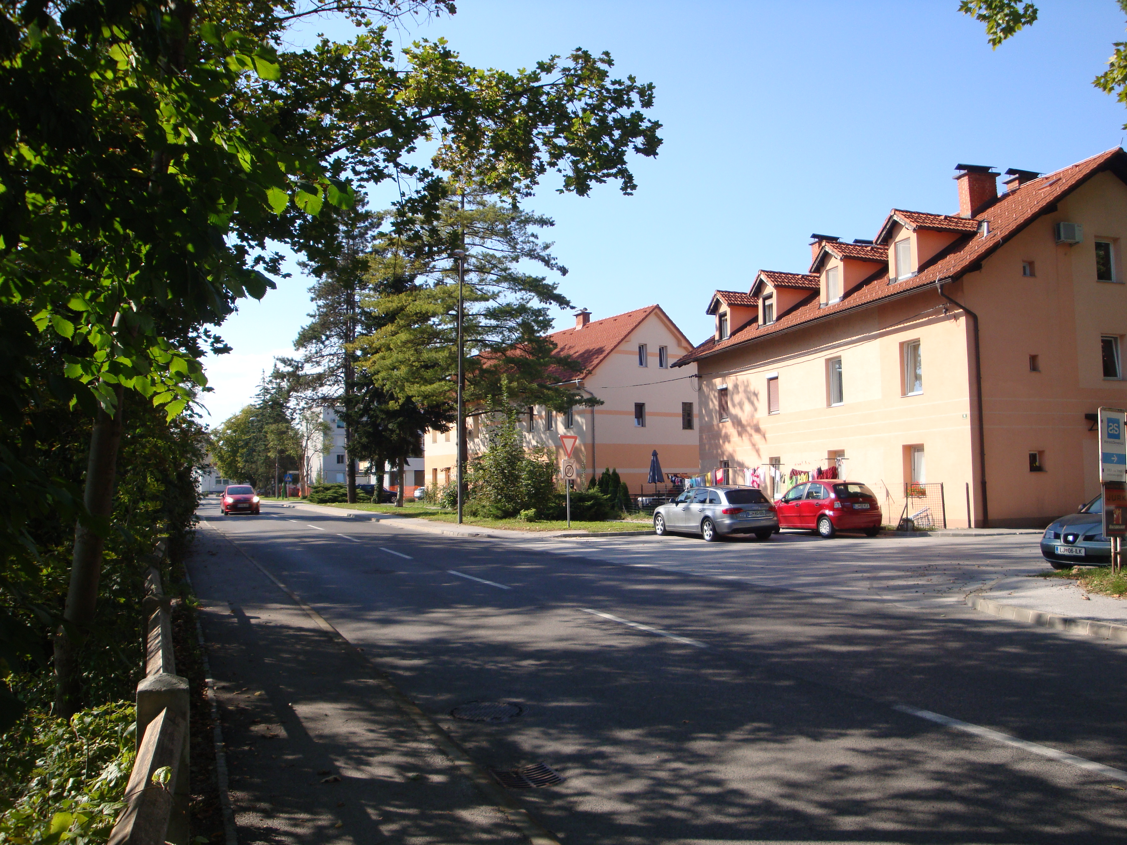 Vevče, Ljubljana.